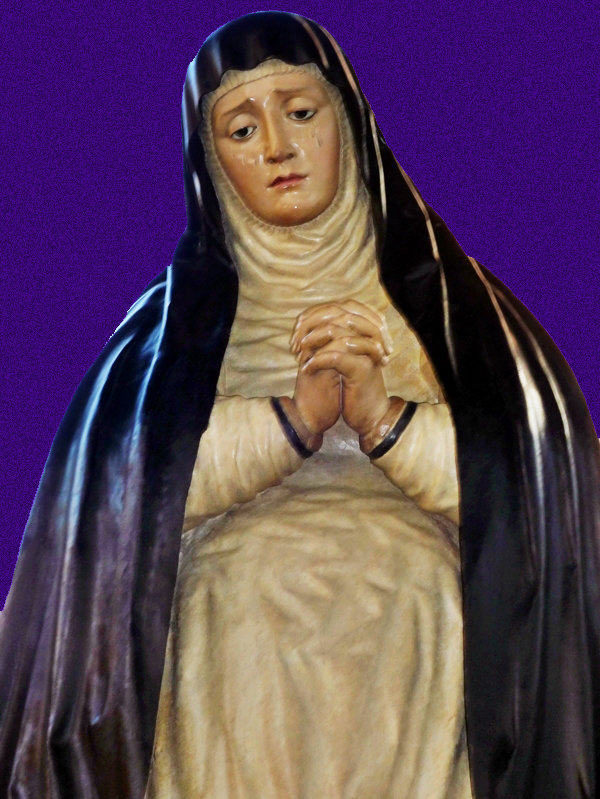 Vírgen de la Amargura. Atribuida a Juan Antonio de la Peña, 1682. Real cofradía de Mineva y Vera Cruz. Foto. G. Márquez